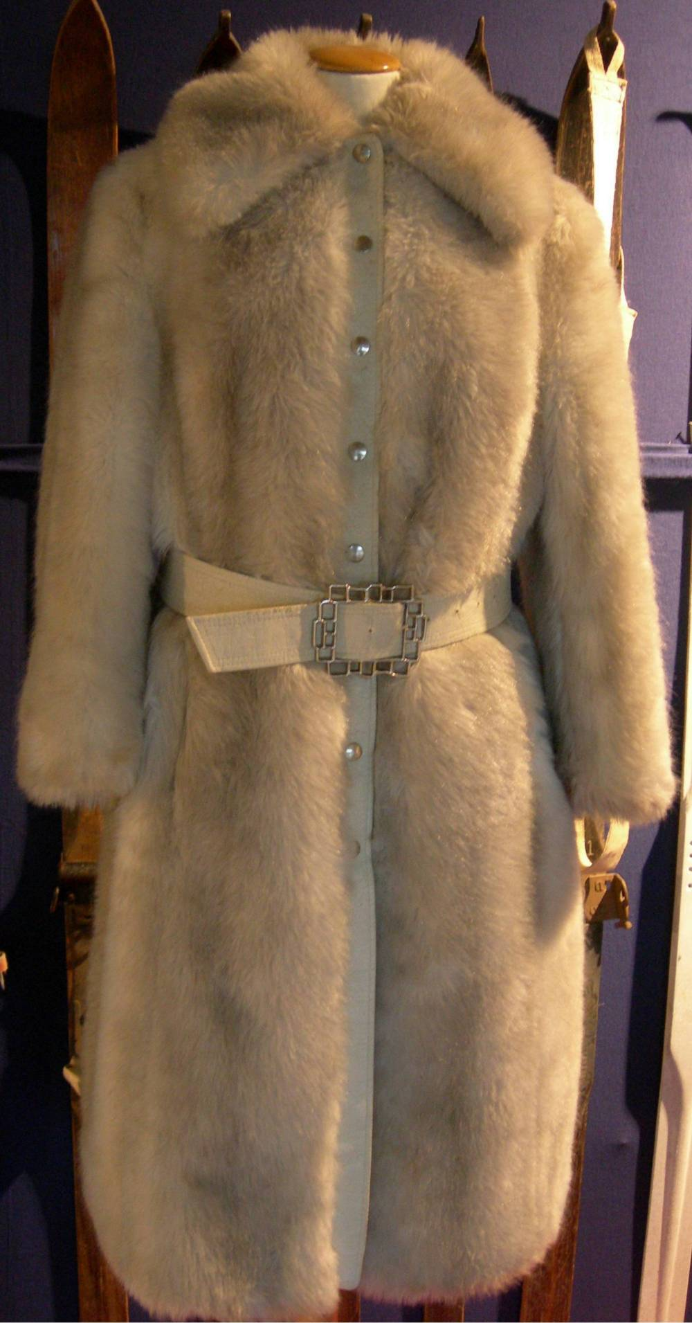 * Olympische Winterspiele 1972 - Mantel von Margit Schumann (Rennrodlerin). Eigenes Foto, gemacht im Thüringer Wintersportmuseum in Oberhof.